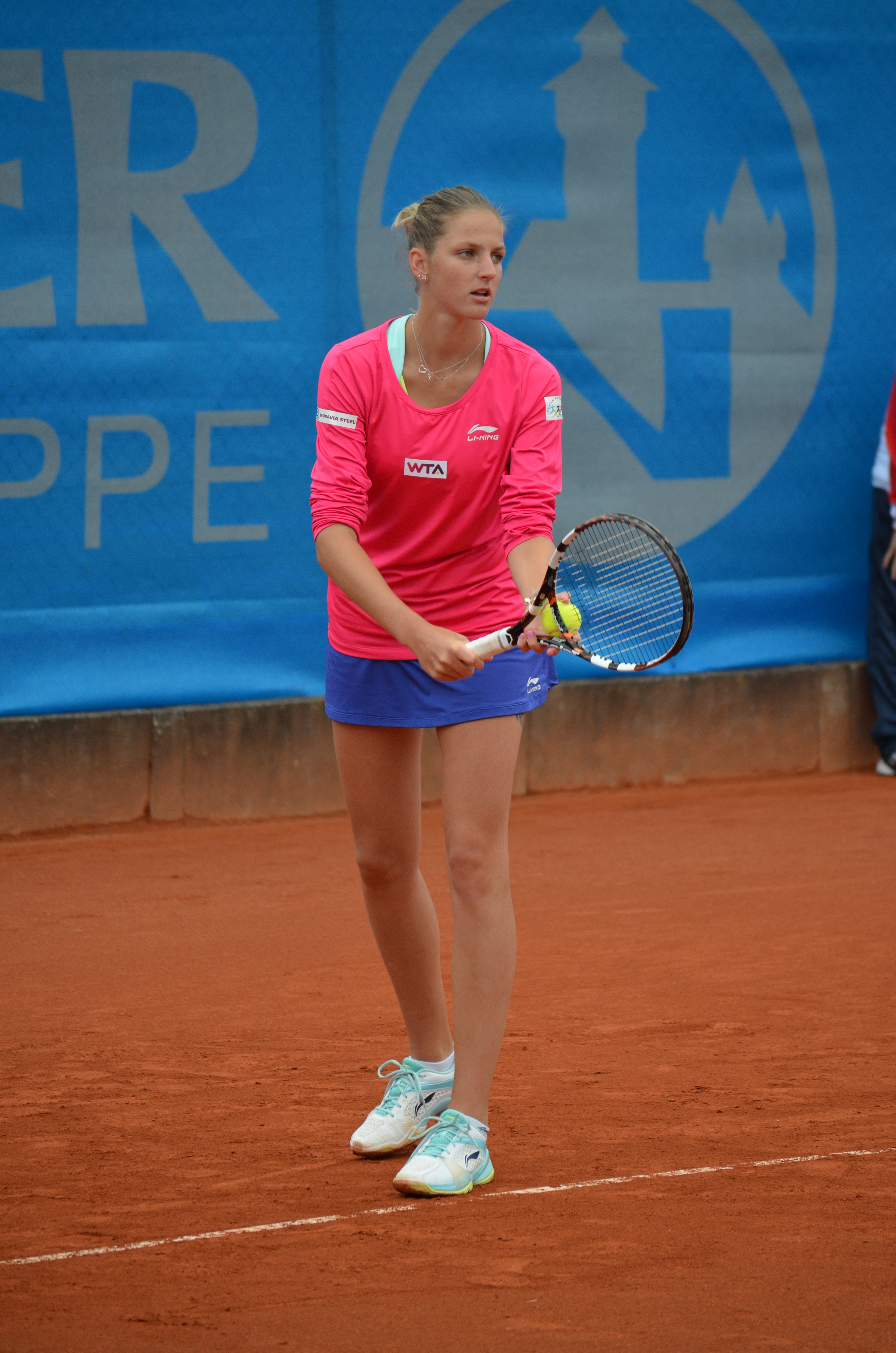 Karolina Pliskova in der Erstrundenbegegnung der Doppelkonkurrenz beim Nürnberger Versicherungscup 2014